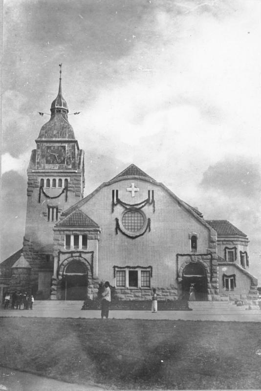 Tsingtau, Neue Kirche China, Tsingtau.- Neue Kirche/Christuskirche